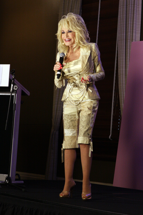 Dolly Parton